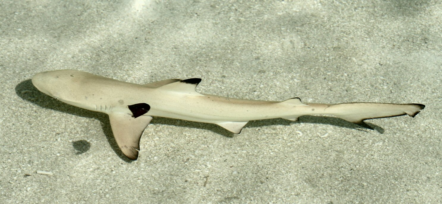 Junger Schwarzspitzen-Riffhai direkt am Strand, Velidhu/Malediven